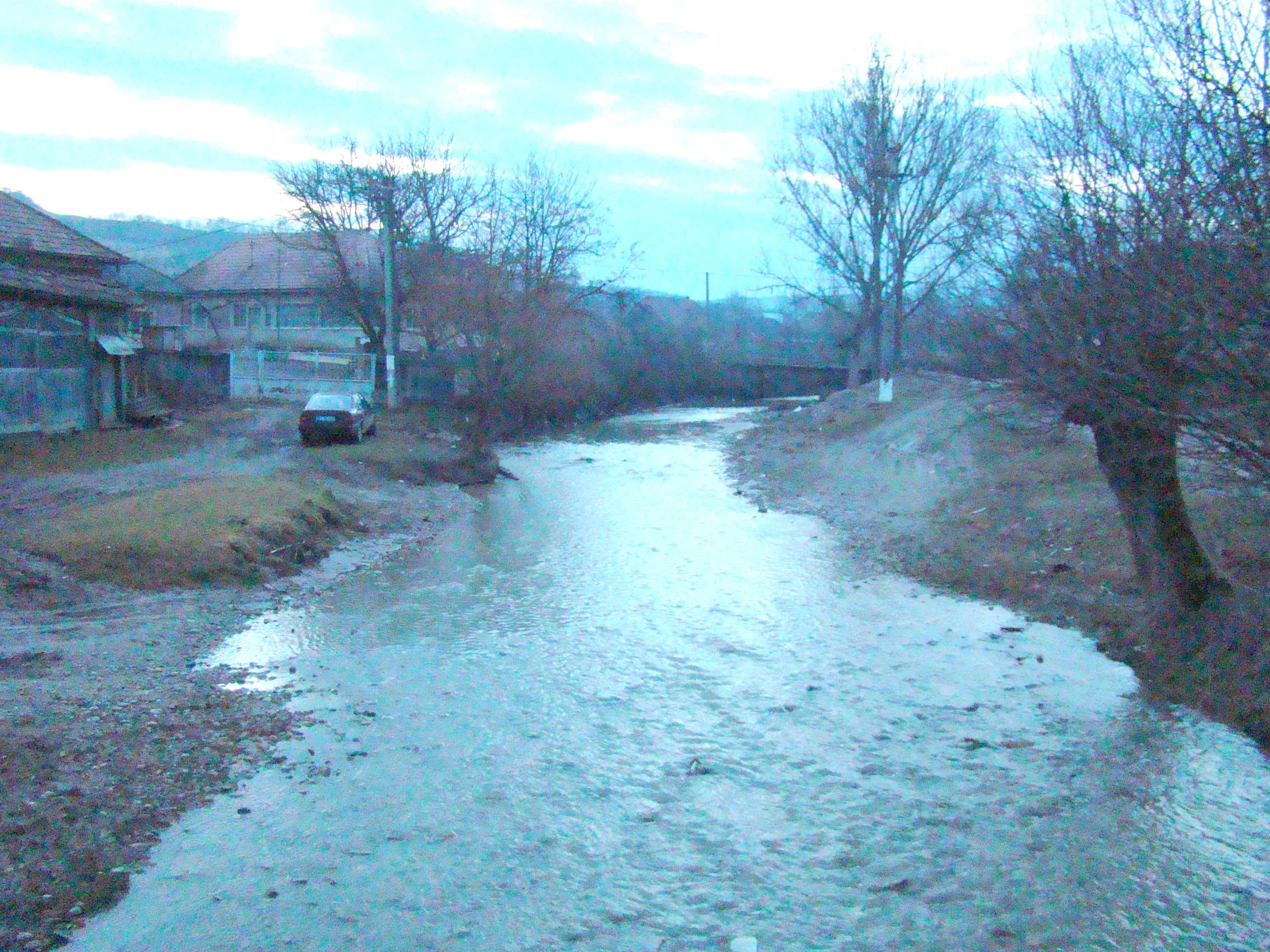 Biserica de lemn „Pogorârea Sf.Duh” din Fildu de Sus, Sălaj